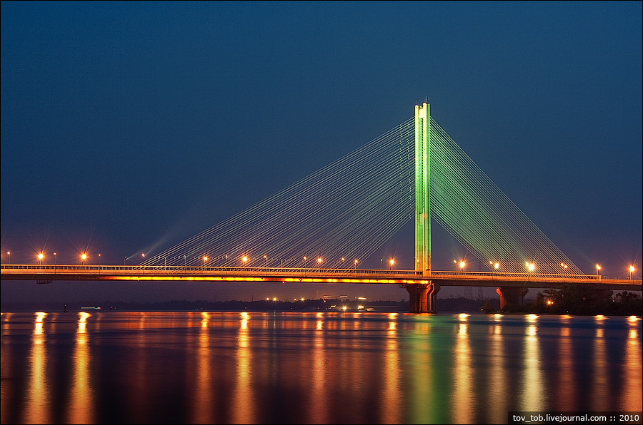 Південний міст у Києві